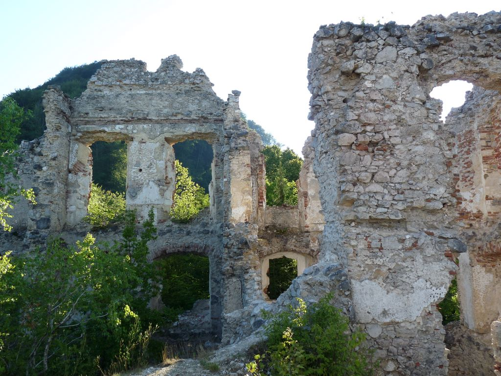 Grad Žusem